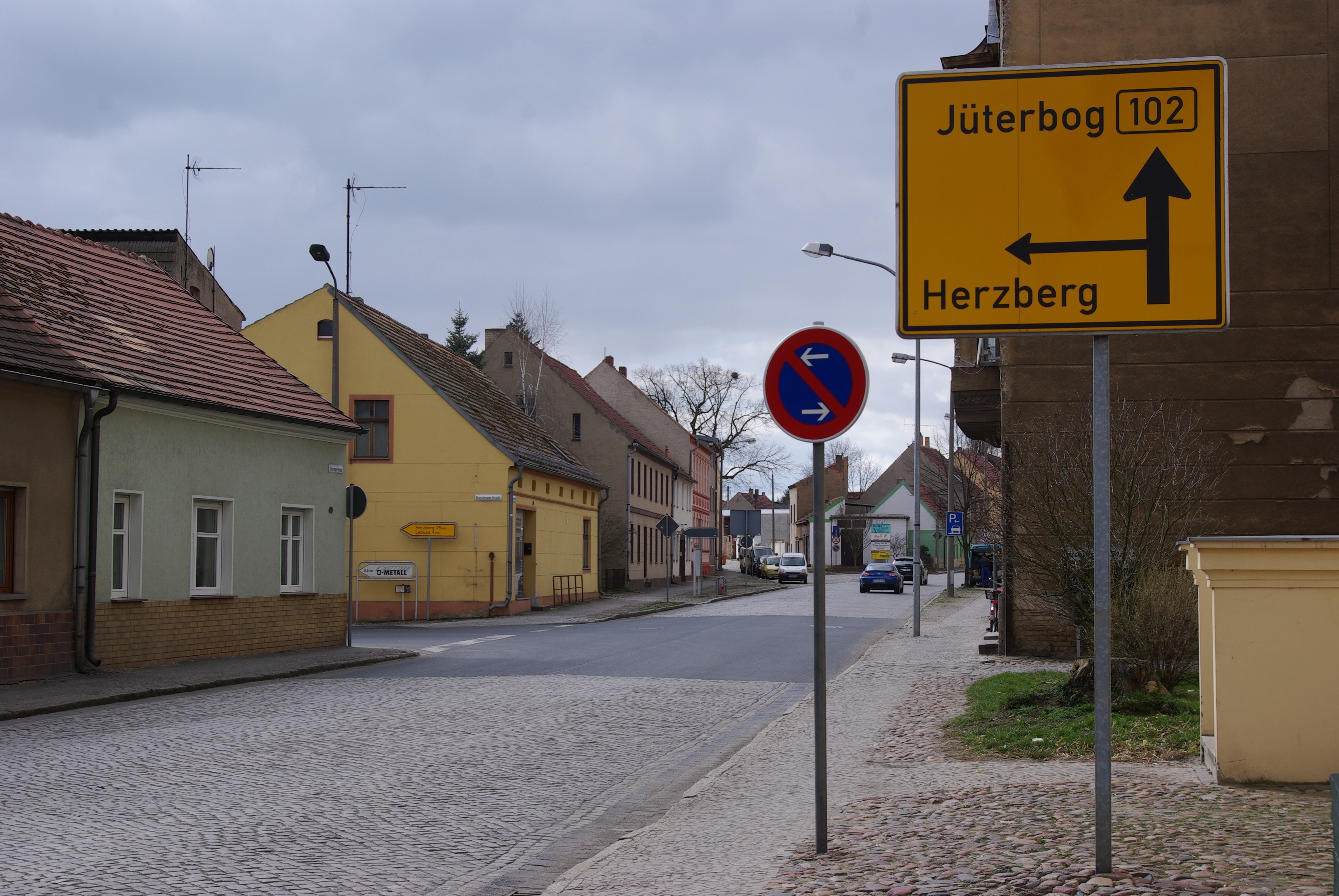 Dahme/Mark in Brandenburg. Die Bundesstraße 102 am Abzweig nach Herzberg in Richtung Jüterbog.